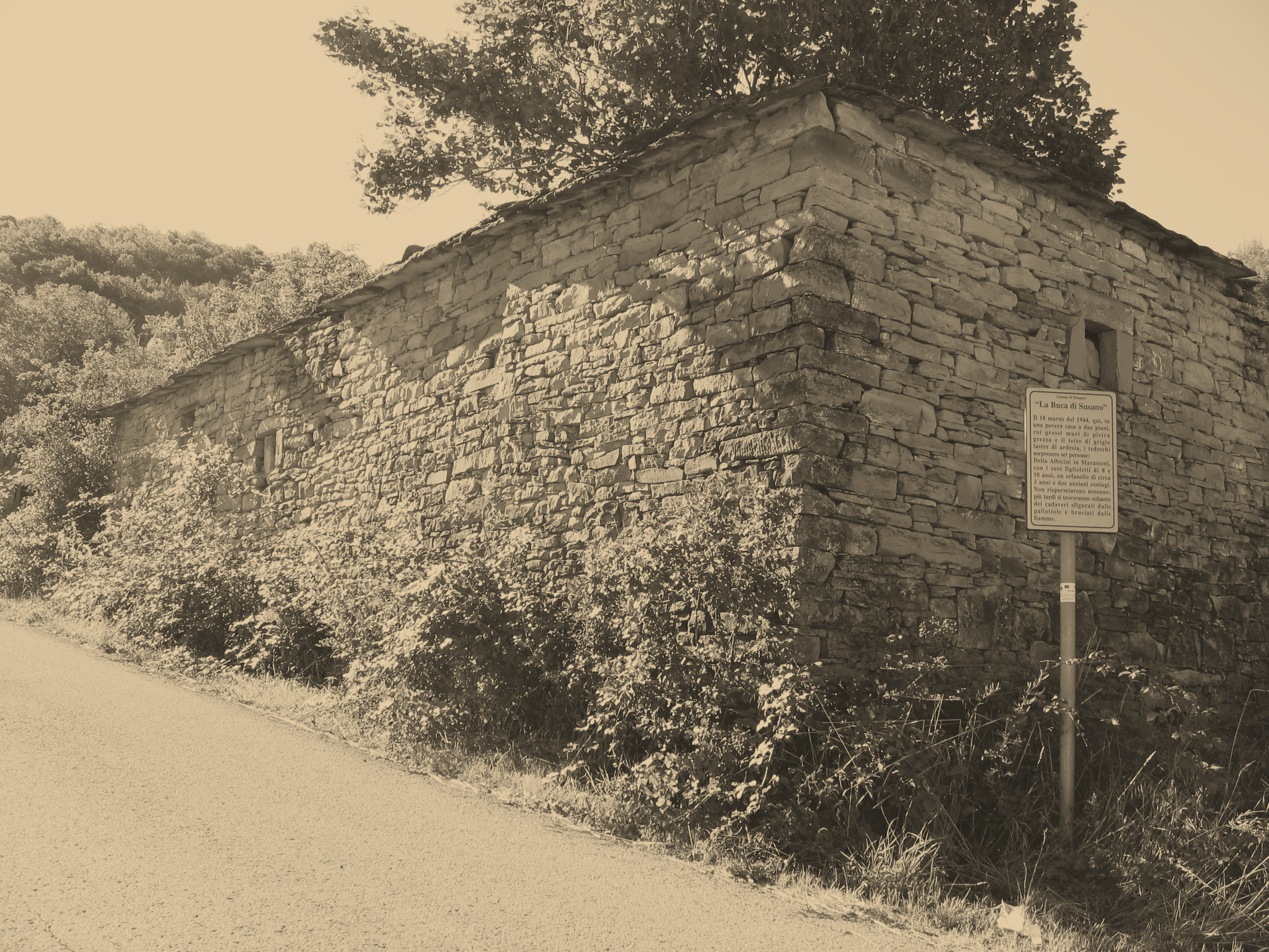 Buca di Susano- strage di Monchio, Susano e Costrignano, Italy